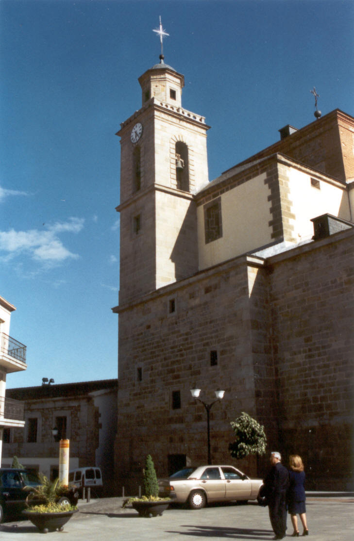 Iglesia de San Martín de Valdeiglesias (Madrid). Autor: Fev. Fecha: Mayo 2002.